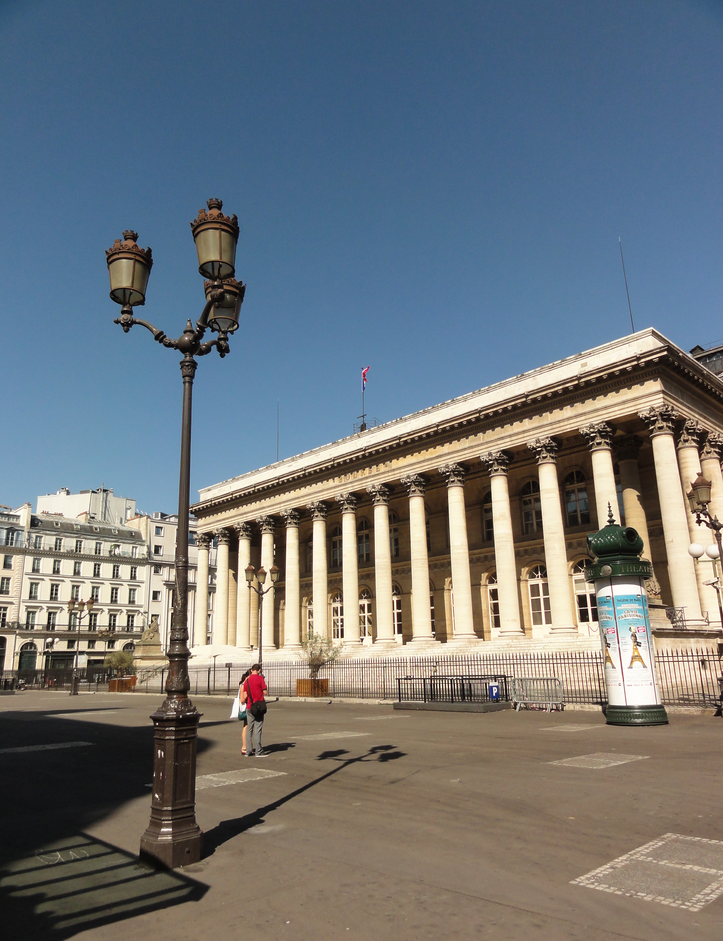 Palais Brongniart